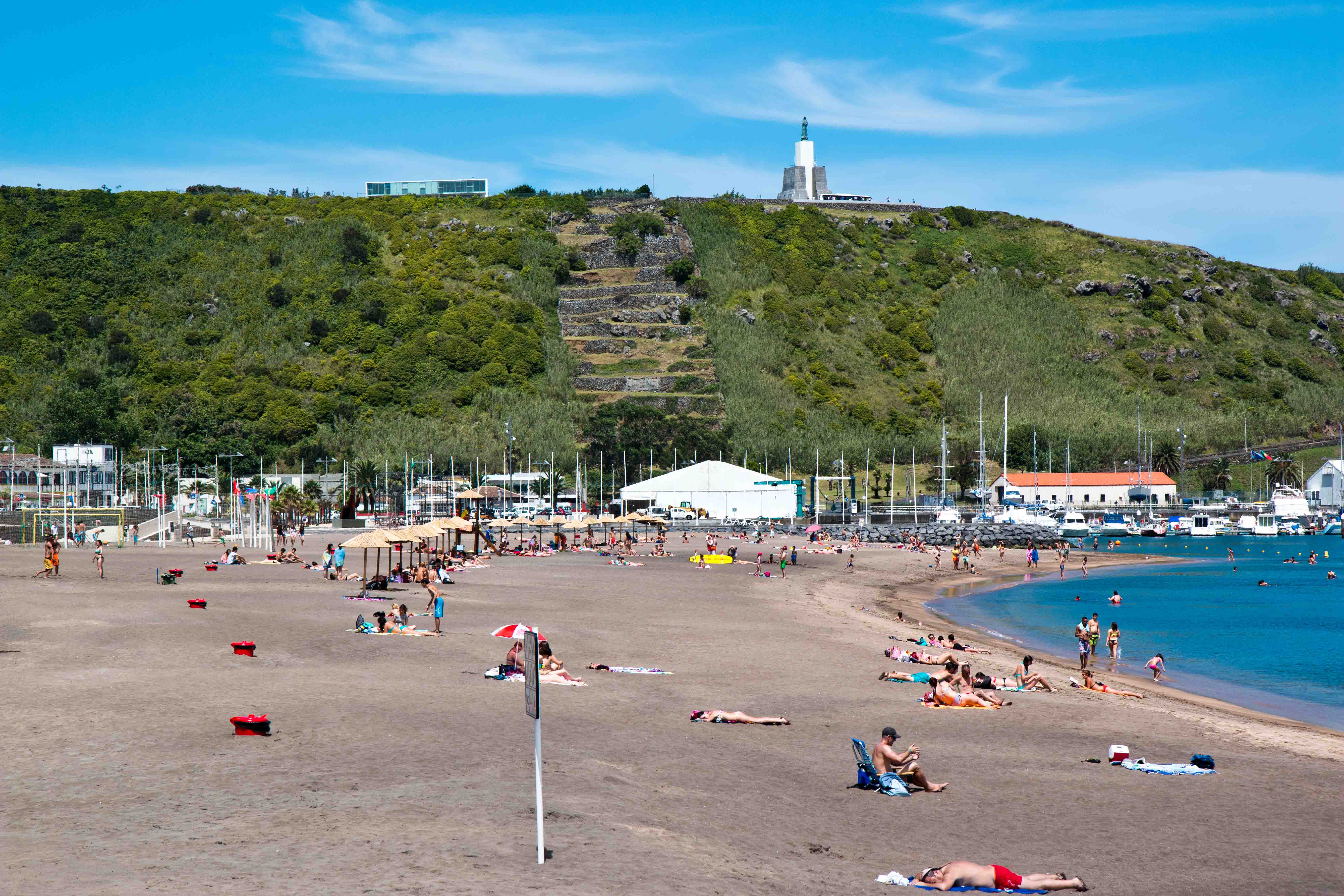 Prainha